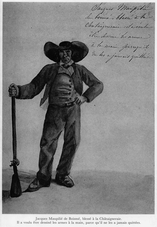 Jacques-Louis Maupillier. Ce dessin et l'écriture manuscrite à été faite par Madame de la Rochejaquelein en 1826 Source: Nos Trois Branches